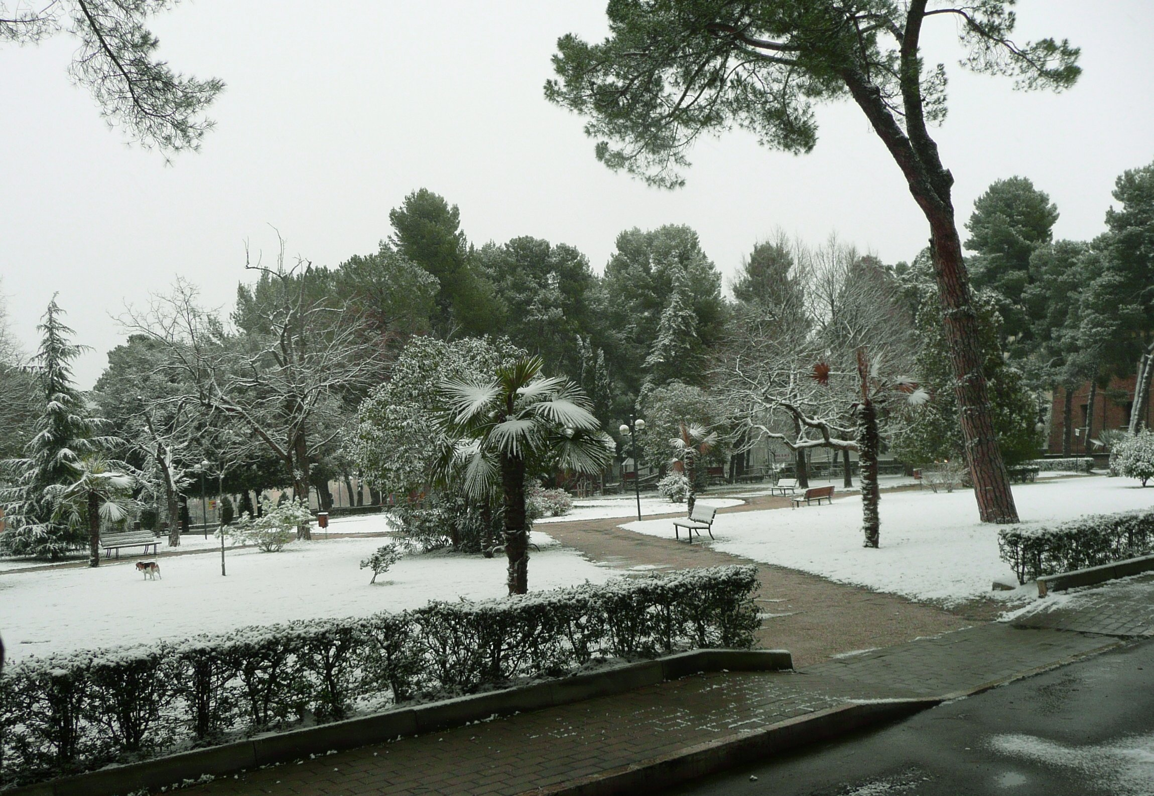 Parco Ivan Graziani, Teramo, durante la nevicata del 15 12 07